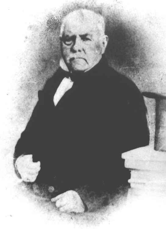 Иван Денкоглу (1781-1861), български възрожденец